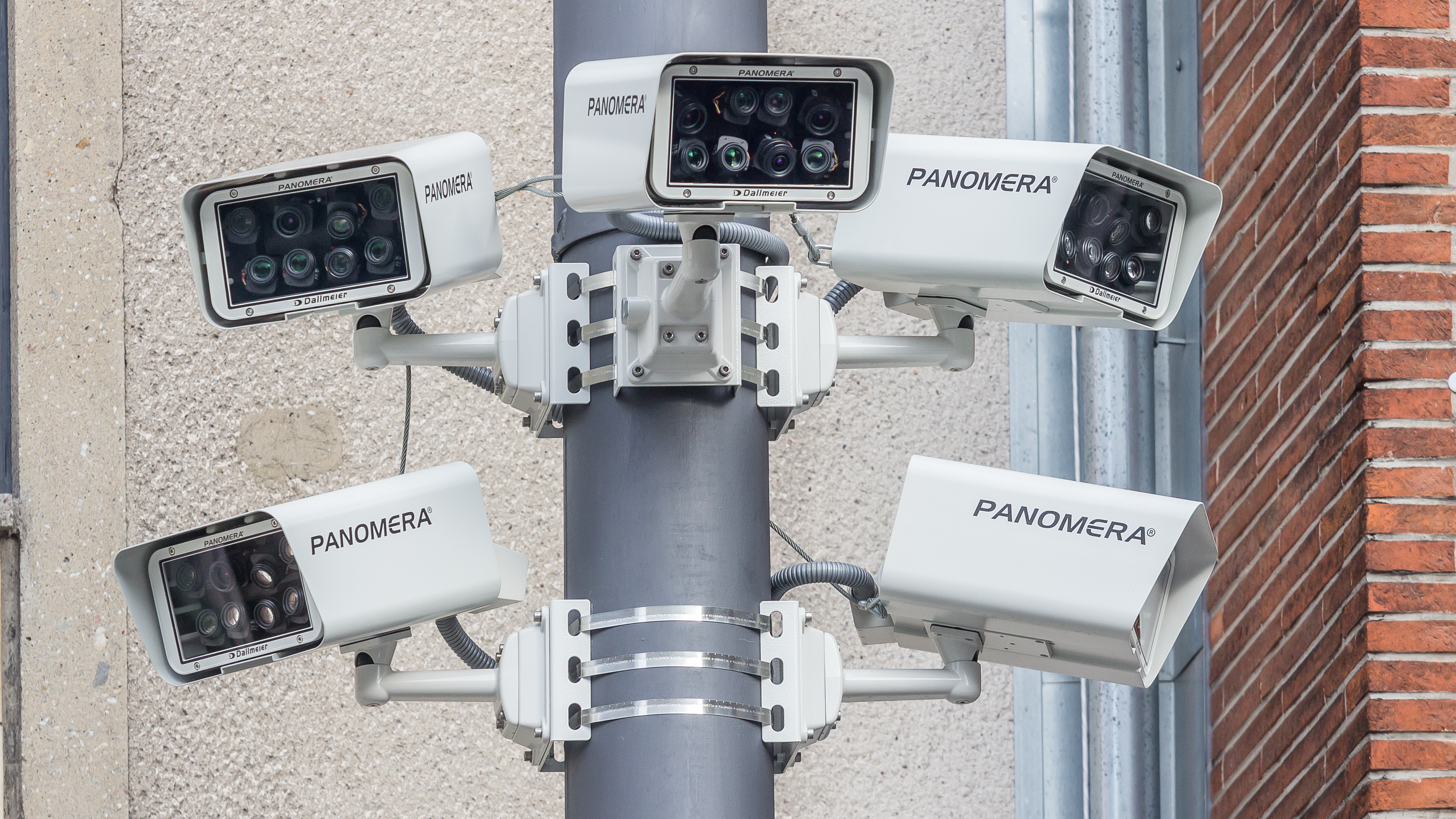 Überwachungskameras Bahnhofsvorplatz Köln. Hersteller: Dallmeier. Modell: Panomera. Jedes Kameragehäuse enthält 8 Einzelkameras